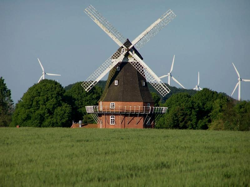 Windmühle und Windräder in Goldenbow